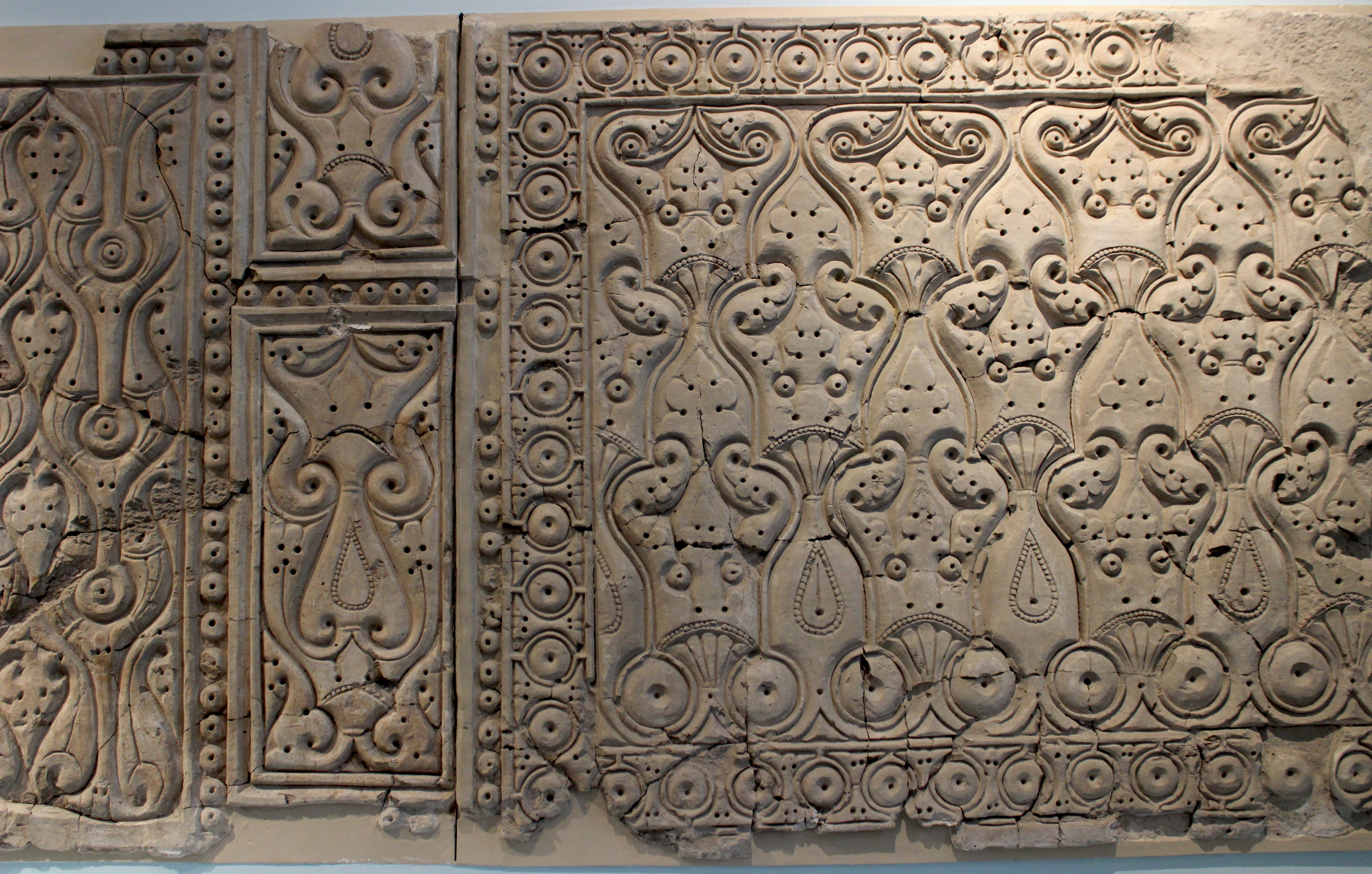 Berlín, Museo de arte islámico, revestimiento de estuco de una casa de Samarra, s. IX.